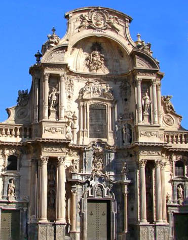 Fachada principal Catedral de Murcia